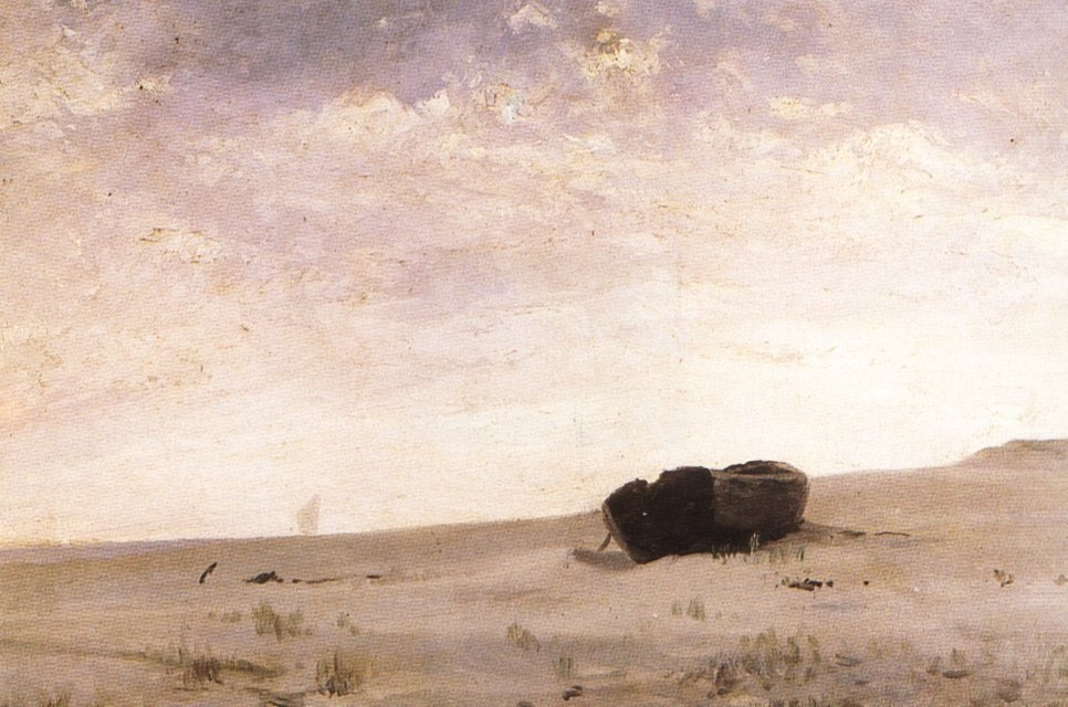 Marina